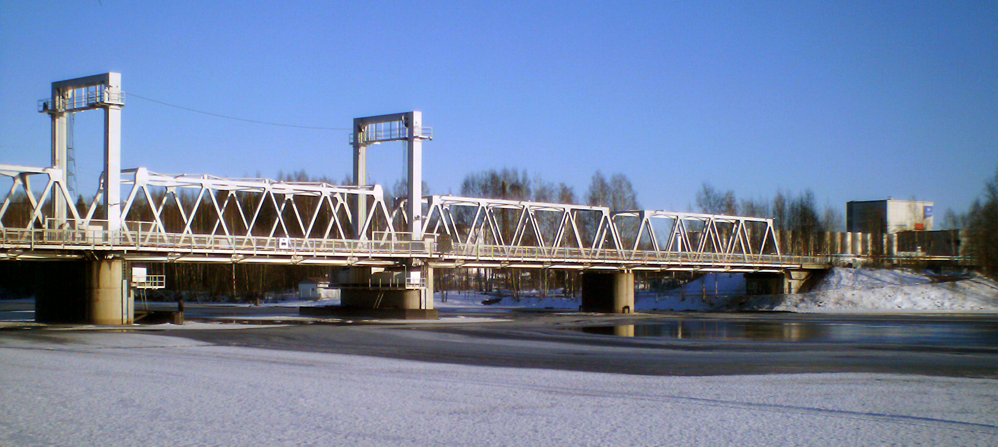 Joensuun rautatiesiltaa maaliskuussa